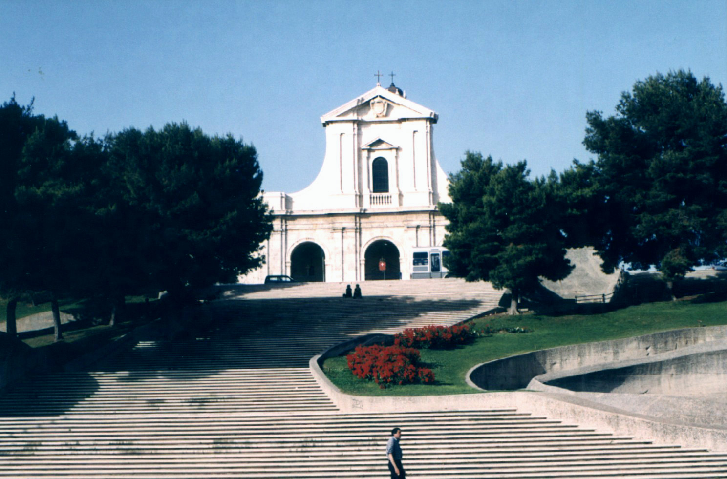 La facciata settecentesca della basilica di Bonaria, in cima all'ampia scalinata, Cagliari